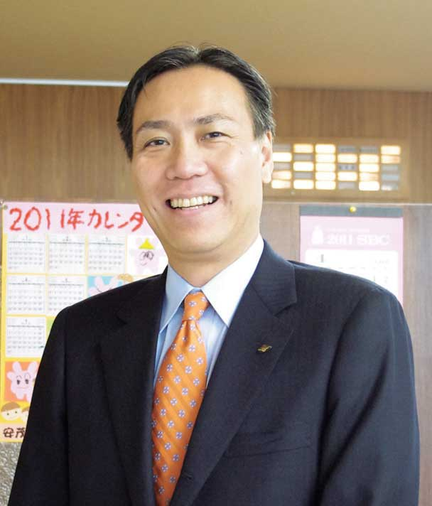 長野県知事 阿部守一 （2011年撮影）中文（台灣）: 長野縣知事 阿部守一 （2011年攝影）